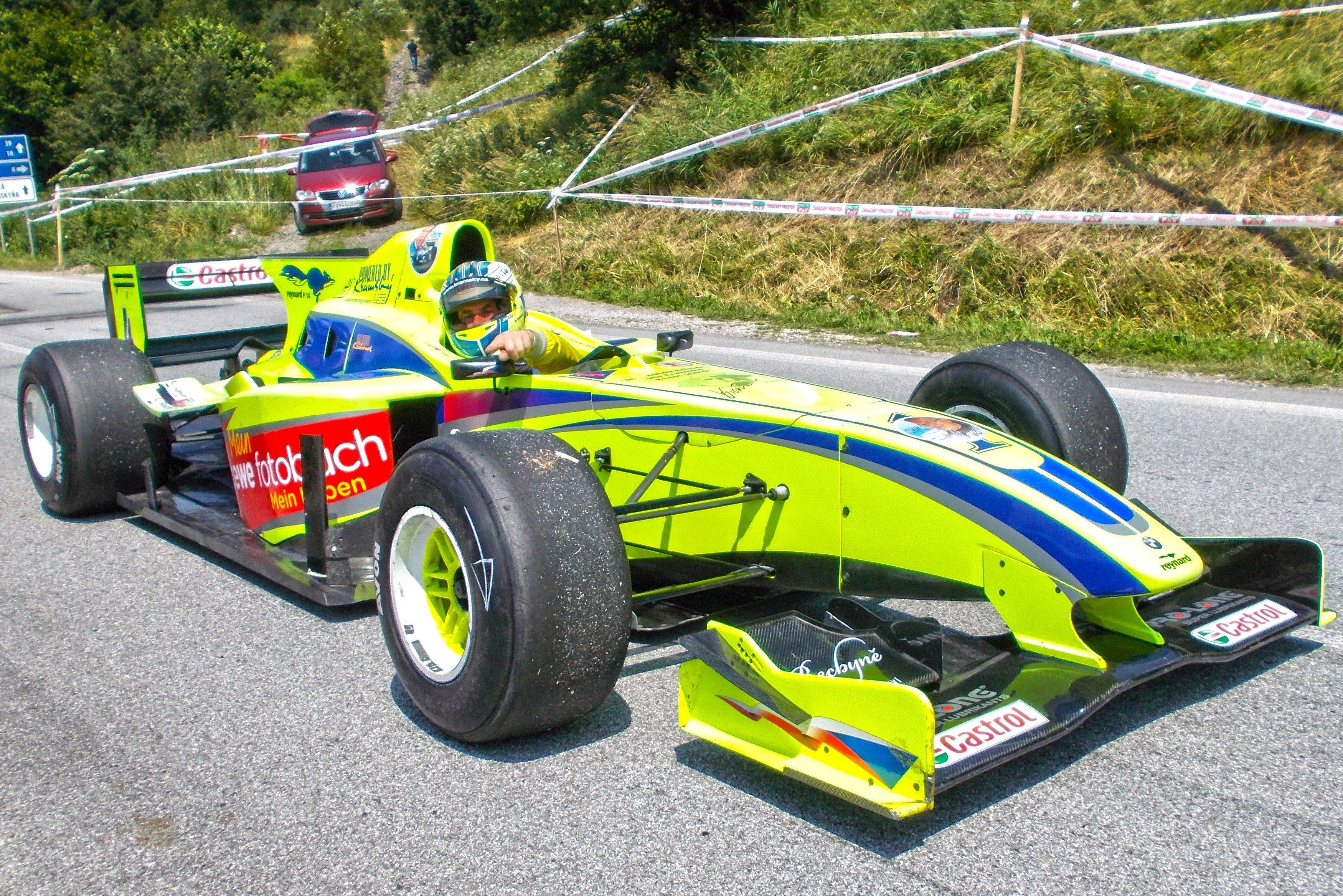 Otakar Krámský počas súťažných jázd pretekov automobilov do vrchu Dobšinský kopec 2014 s monopostom Reynard 99L